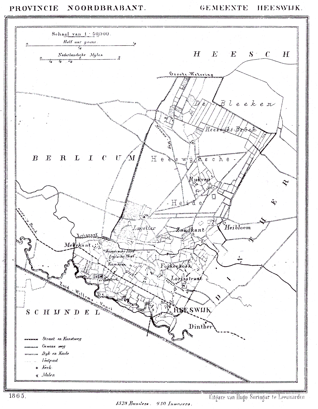 Nederland, Noord-Brabant, Gemeente Heeswijk